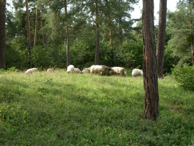 Dünenrundweg Oftersheim – grasende Schafe auf dem Feldherrnhügel im Dünenwald in Oftersheim, Projekt „Badische Binnendünen“, Bereich im Naturschutzgebiet „Oftersheimer Dünen“